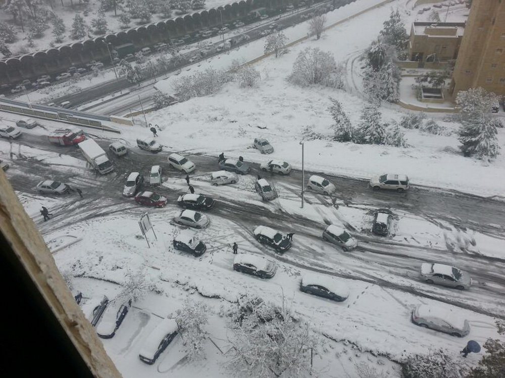 רכבים תקועים בשלג של סופת 2013 בירושלים